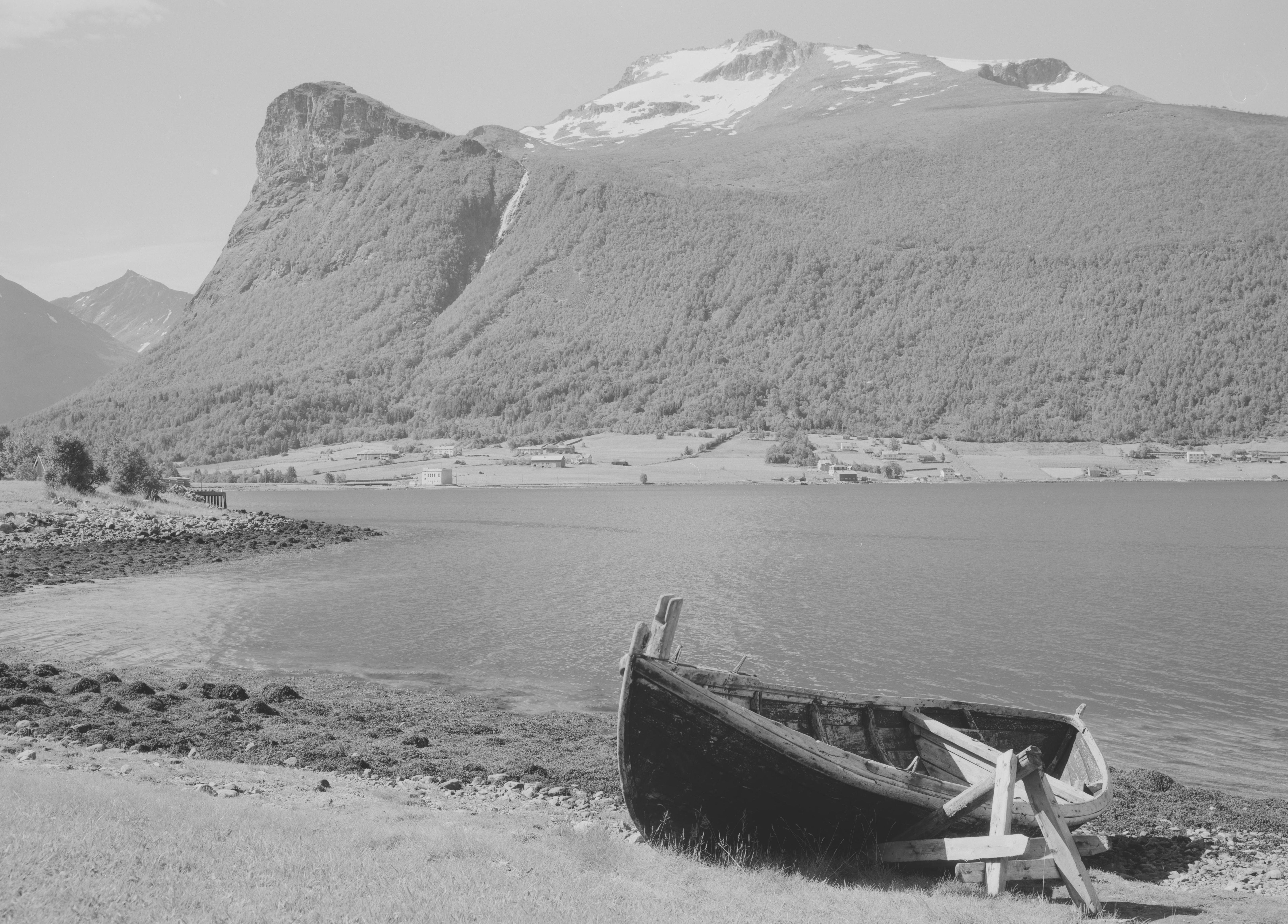 Bildet er hentet fra Nasjonalbibliotekets bildesamling Innfjorden, Rauma, Møre og Romsdal